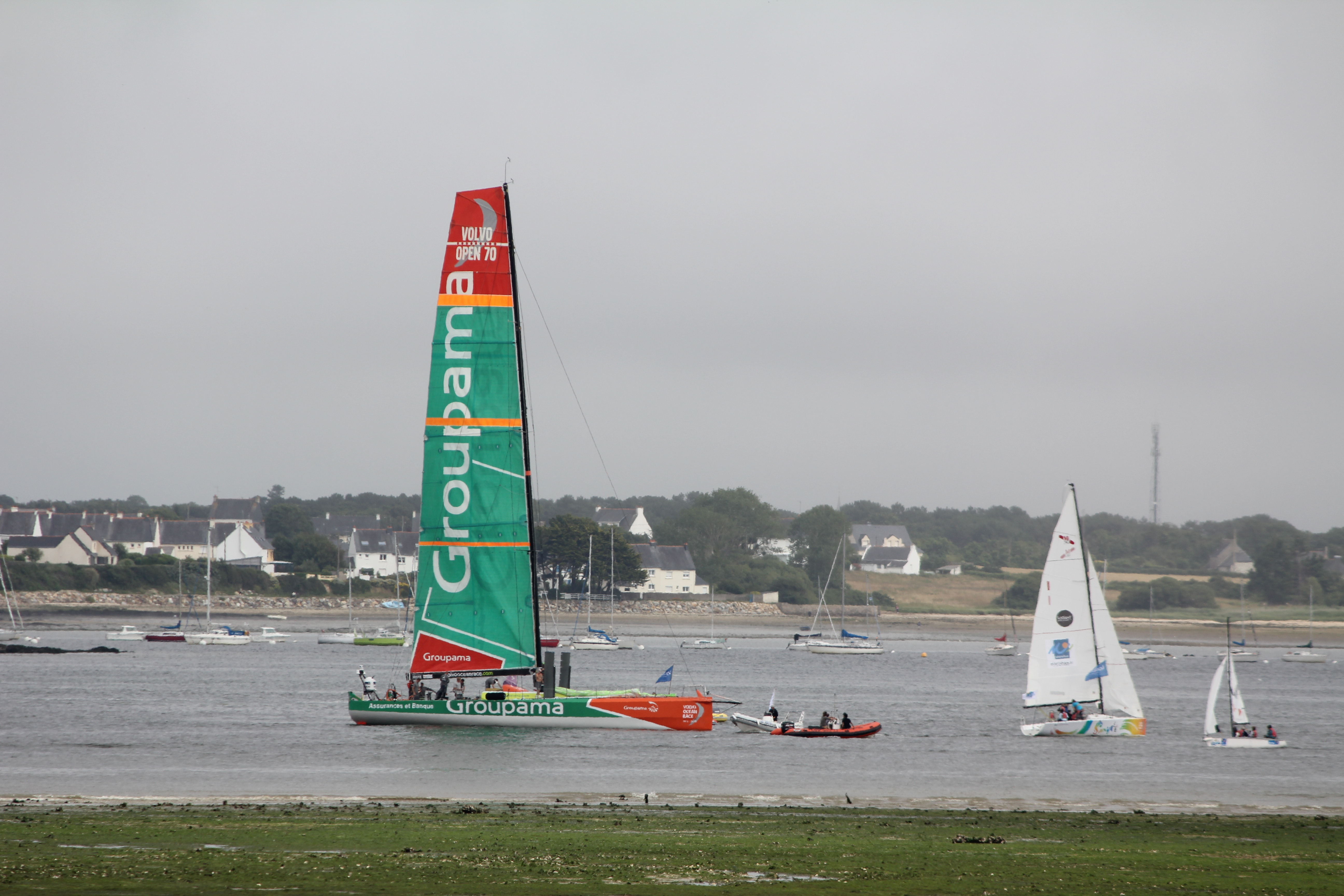 Goupama 4 dans la rade de Lorient pendant l'édition 2012 de la Volvo Ocean Race